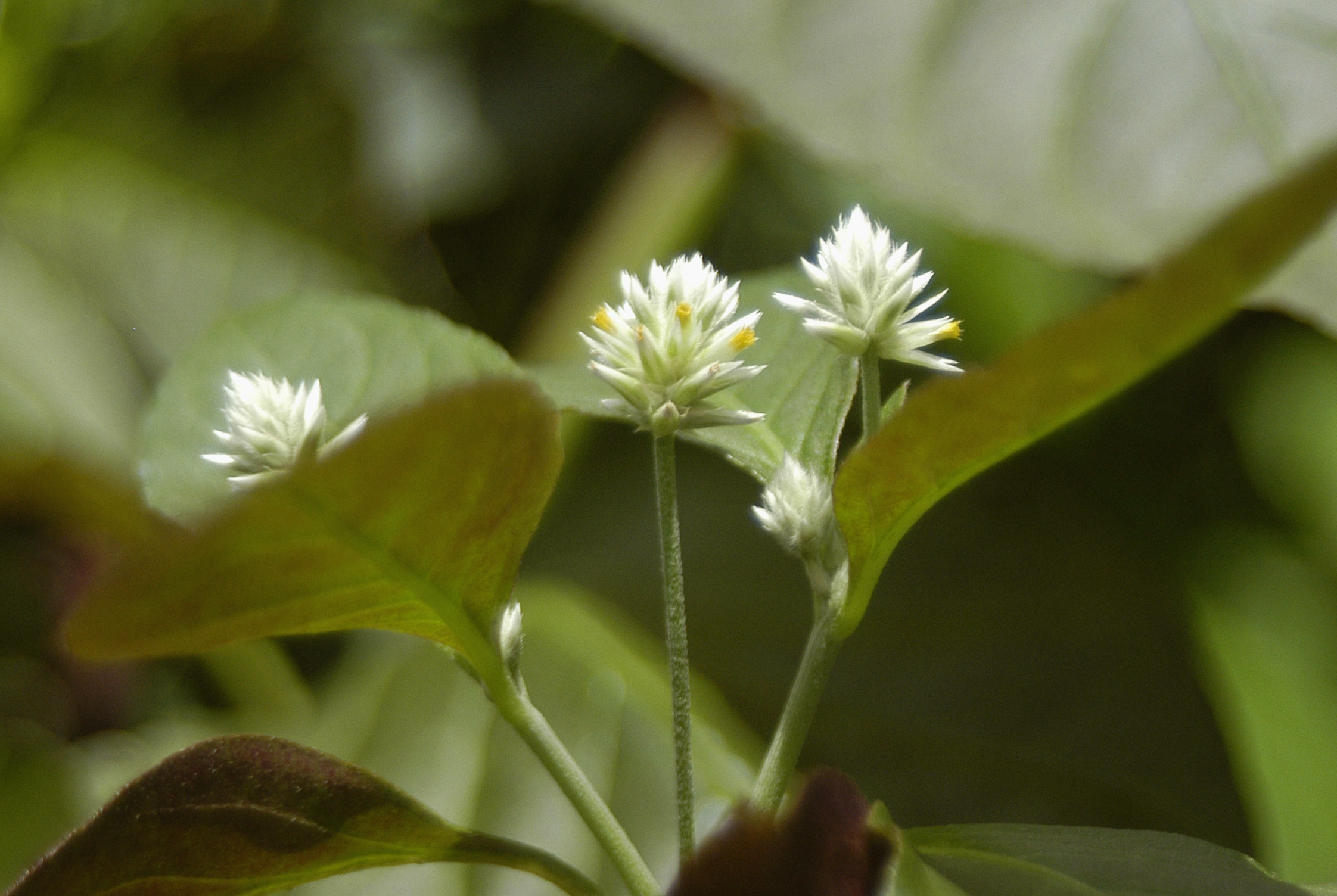 Alternanthera brasiliana, (Alternanthera dentata) conhecida popularmente com Pepétua do mato, terramicina, penicilina e anador